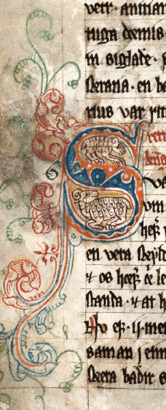 Mittelalterliche Kalligraphie des Initialbuchstabens "S" des Schafsbriefs im Kongsbók von 1298. Entsprechend seinem Inhalt werden hier zwei Schafe dargestellt.